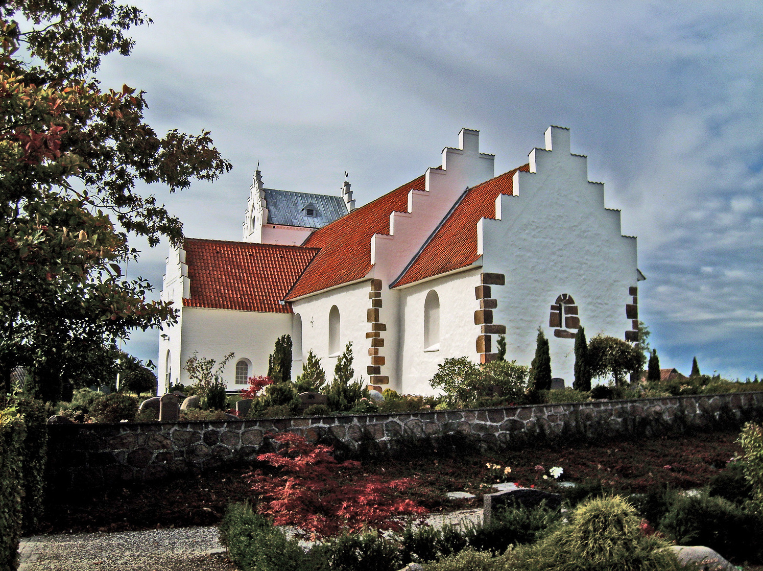 fra sydøst